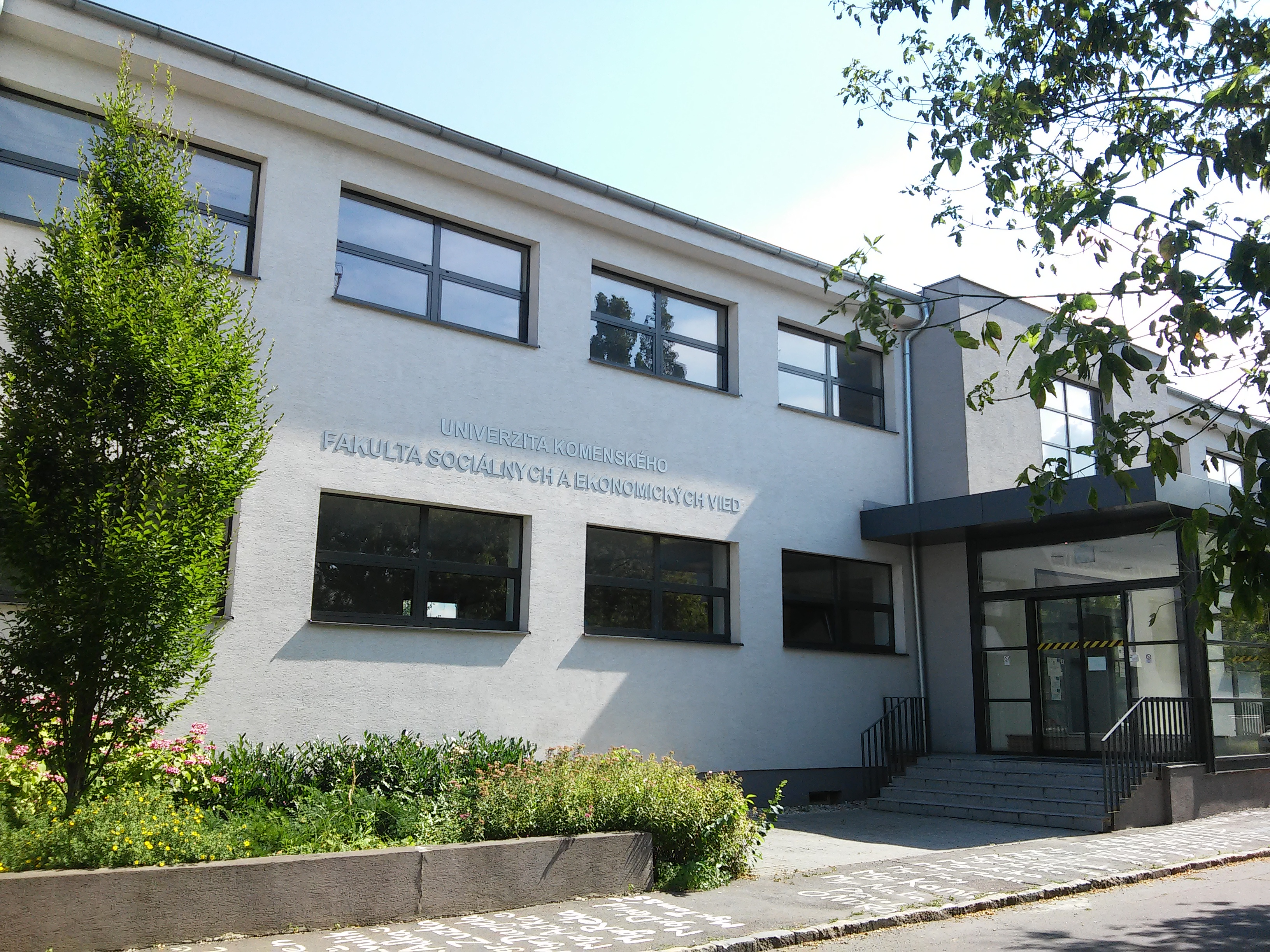 Mlynské luhy, Ružinov, Bratislava